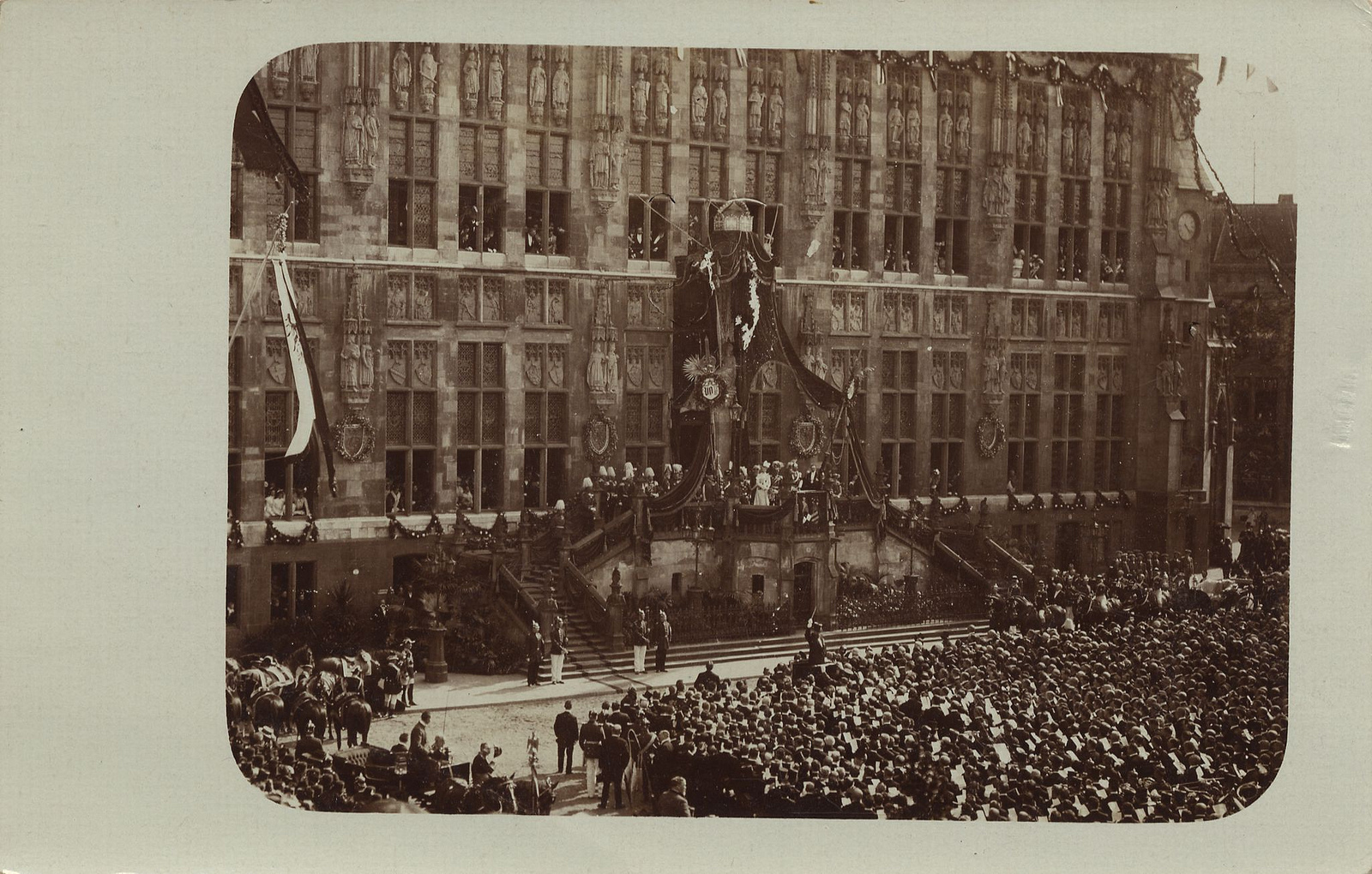 Eröffnung des Aachener Rathauses nach der Restaurierung aufgrund des Brandes von 1883 durch Kaiser Wilhelm II. am 19. Juni 1902.